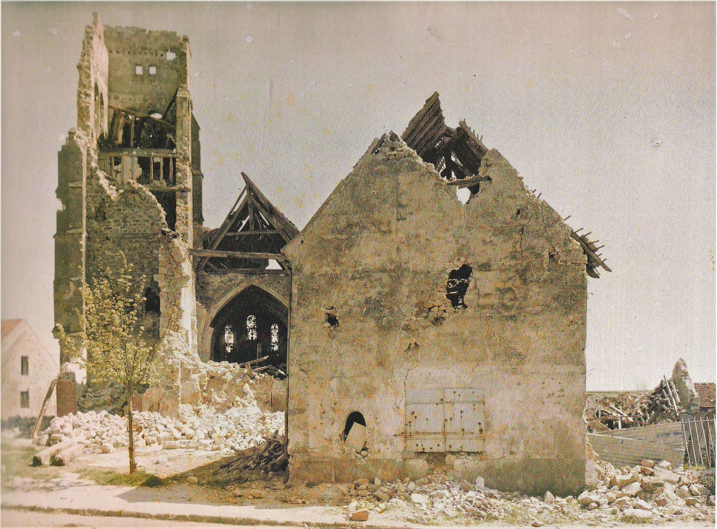 Autochrome de l'église d'étavigny en 1915 .